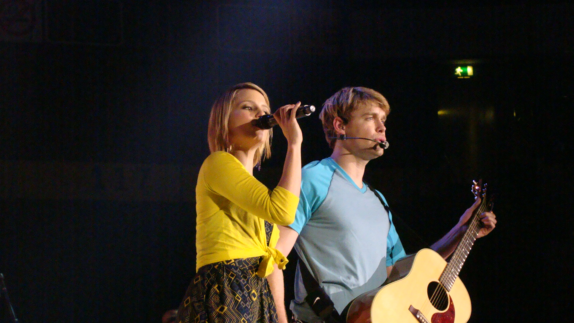 Lucky